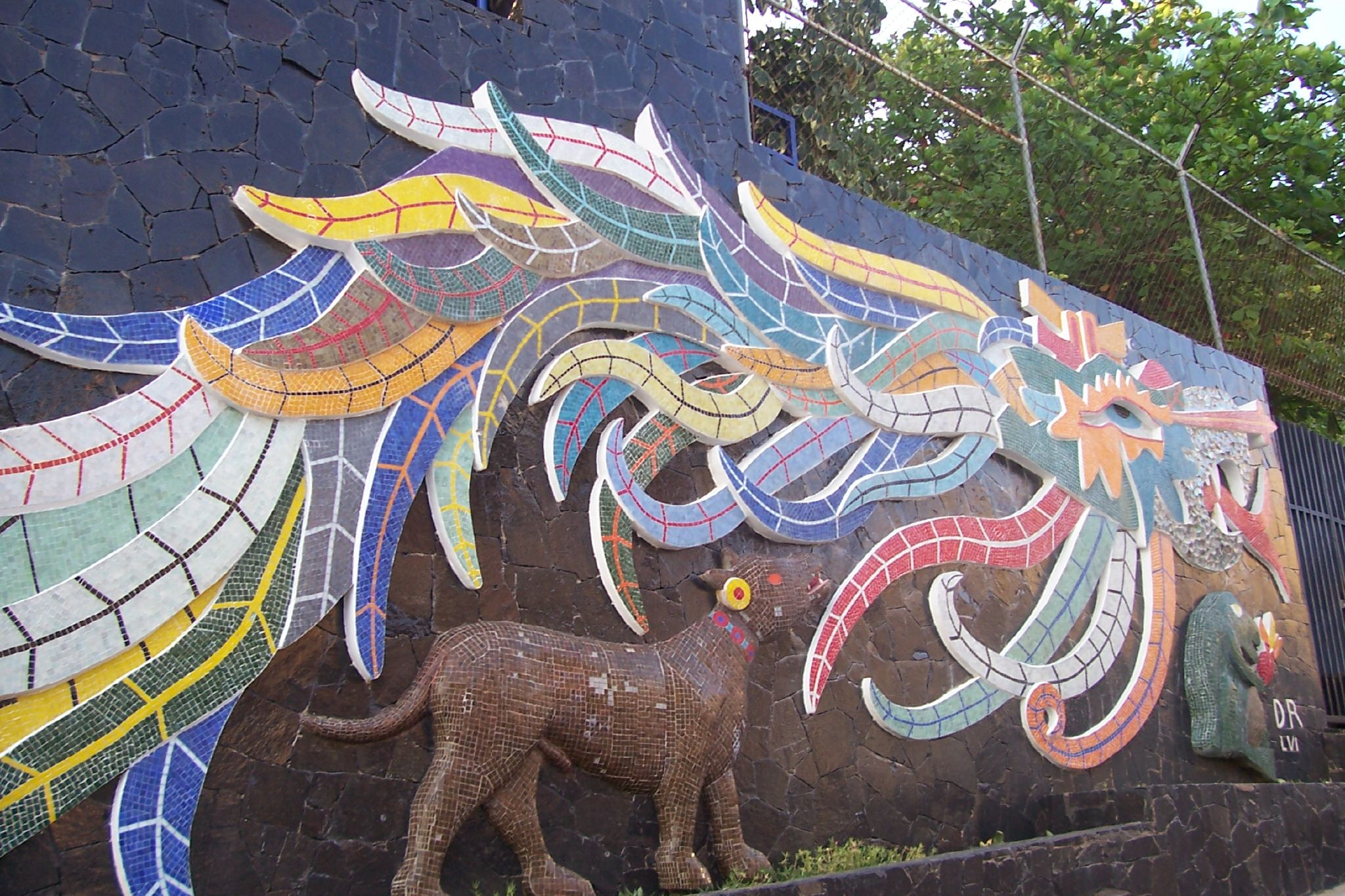 Mural de Quetzalcóatl en la Exekatlkalli (Casa de los Vientos), elaborado por Diego Rivera entre 1956 y 1957 en Acapulco, Guerrero, México.